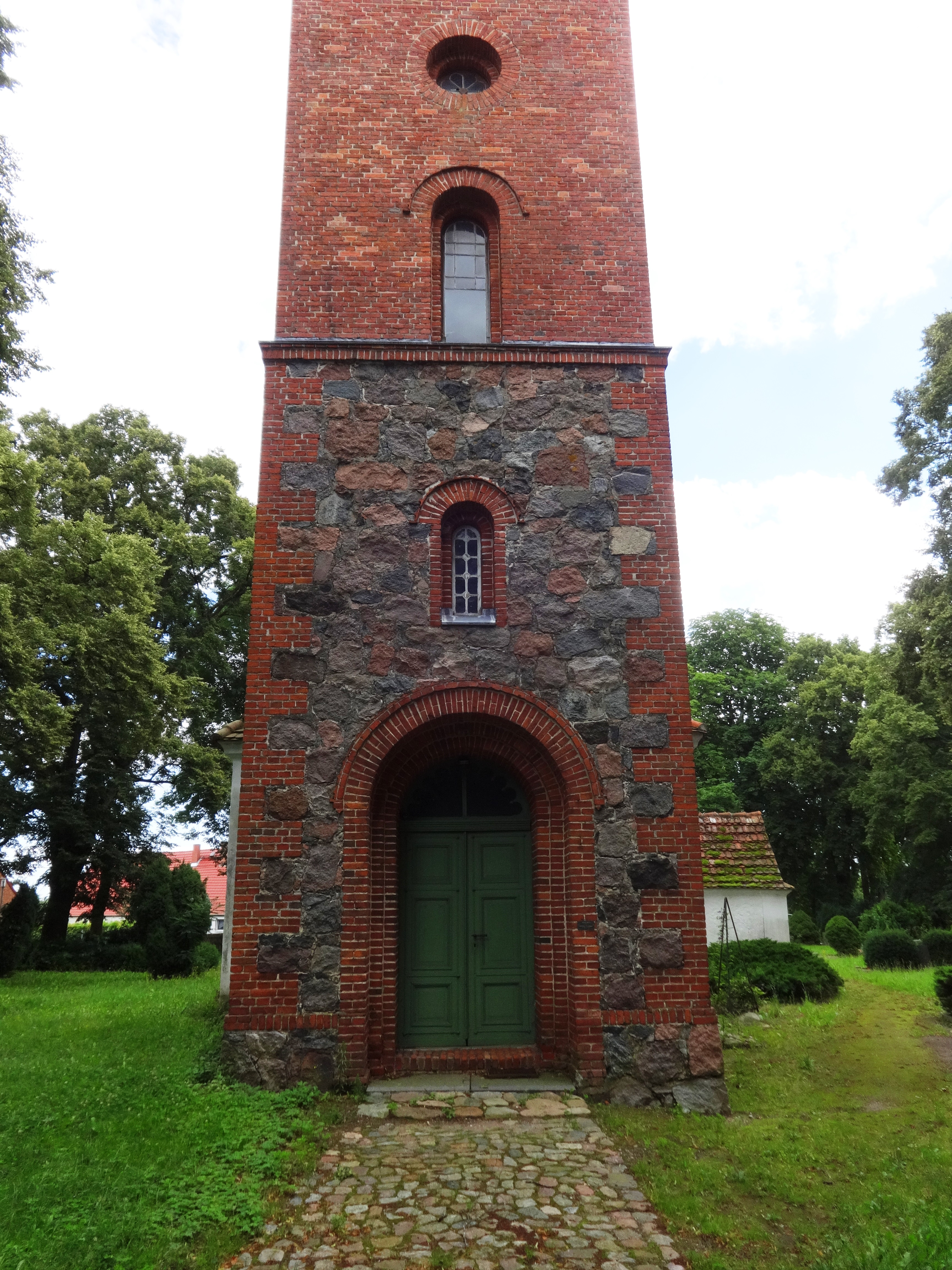 Die Kirche in Alt Teterin ist ein Sakralbau aus dem 15. Jahrhundert in Alt Teterin, ein Ortsteil der Gemeinde Butzow. Im Innern gehören unter anderem ein Taufbecken aus dem 14. Jahrhundert sowie mehrere alte Grabplatten vor dem Altar aus der Zeit um 1400.